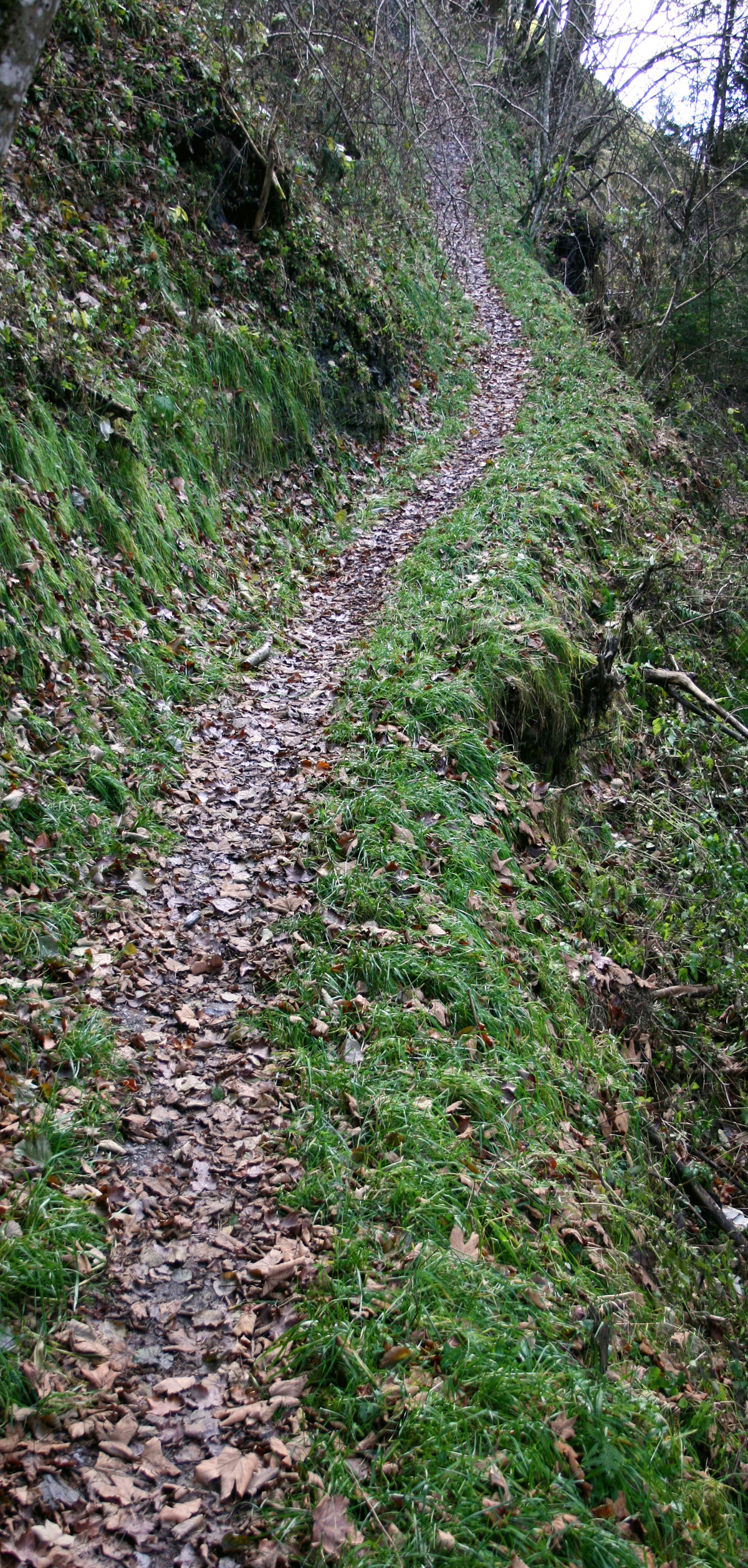 Steig bei Großarl. Steiles Stück des Kapellenwanderweges.